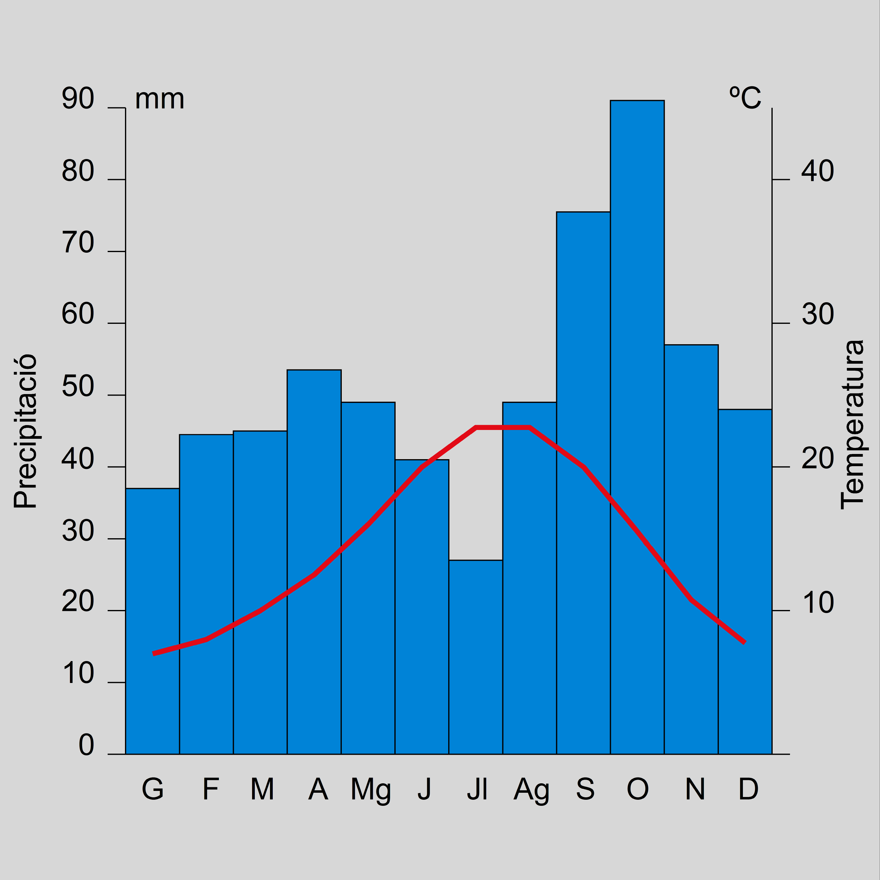 Diagrama ombrotèrmic o climograma de Barcelona Elaboració pròpia Jordi 09:07, 22 August 2005 (UTC)